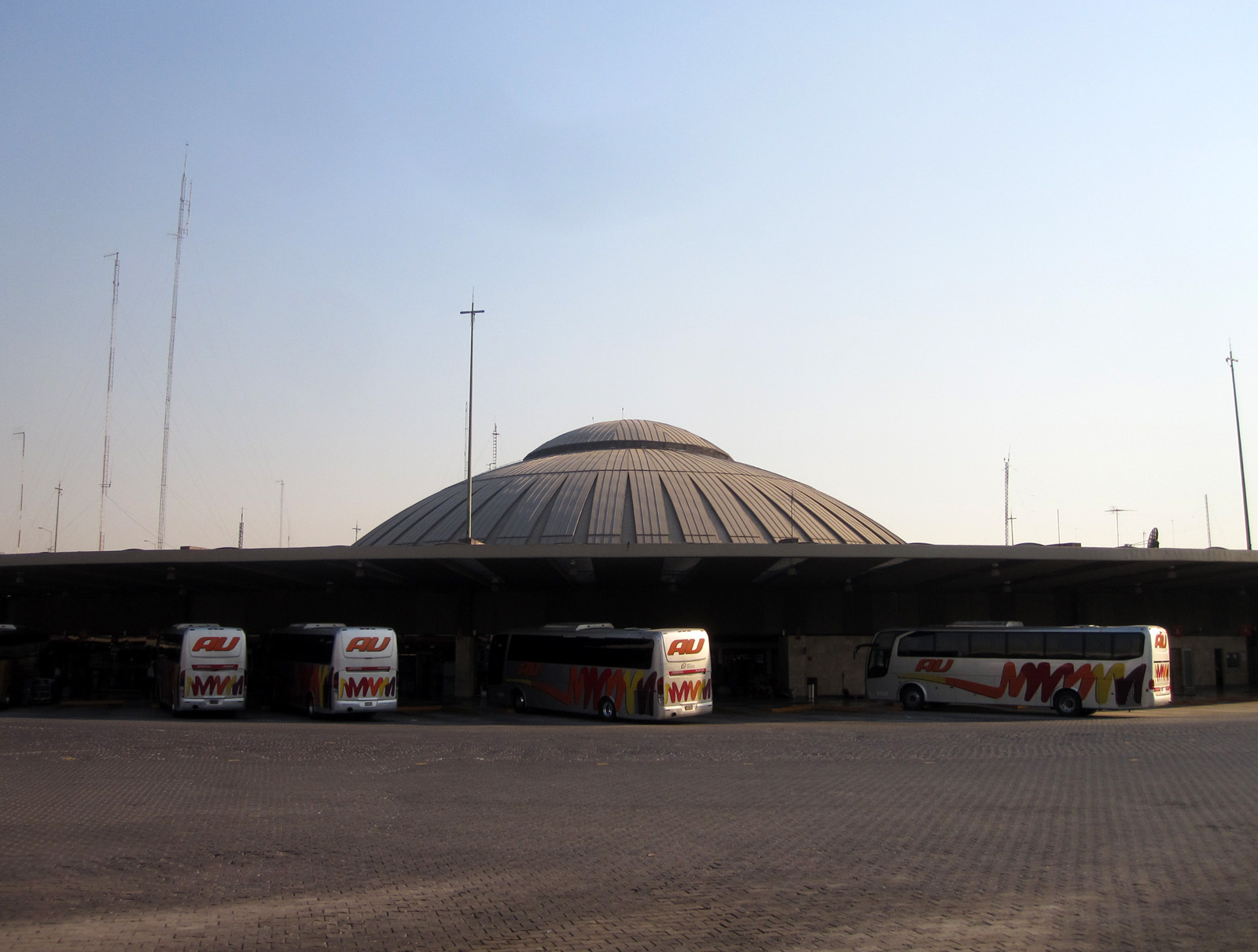 Kuppelen til bussterminalen TAPO i Mexico by